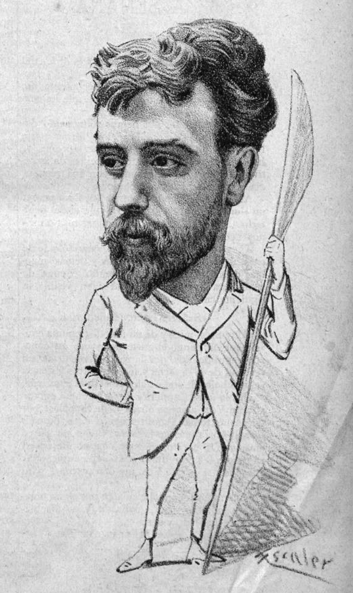 La Semana Cómica, 8 de febrero de 1889.